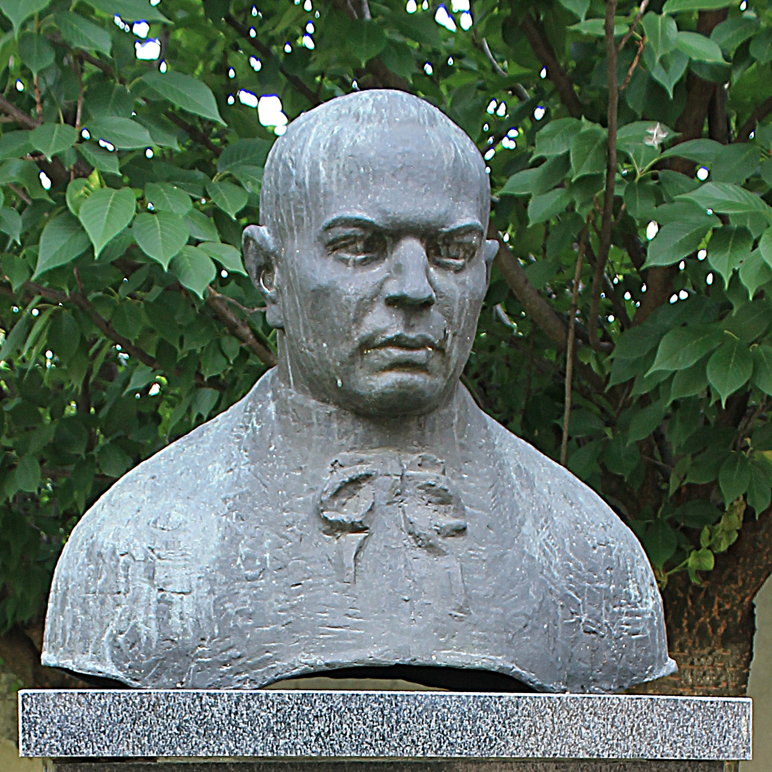 Galerija Sava Šumanović